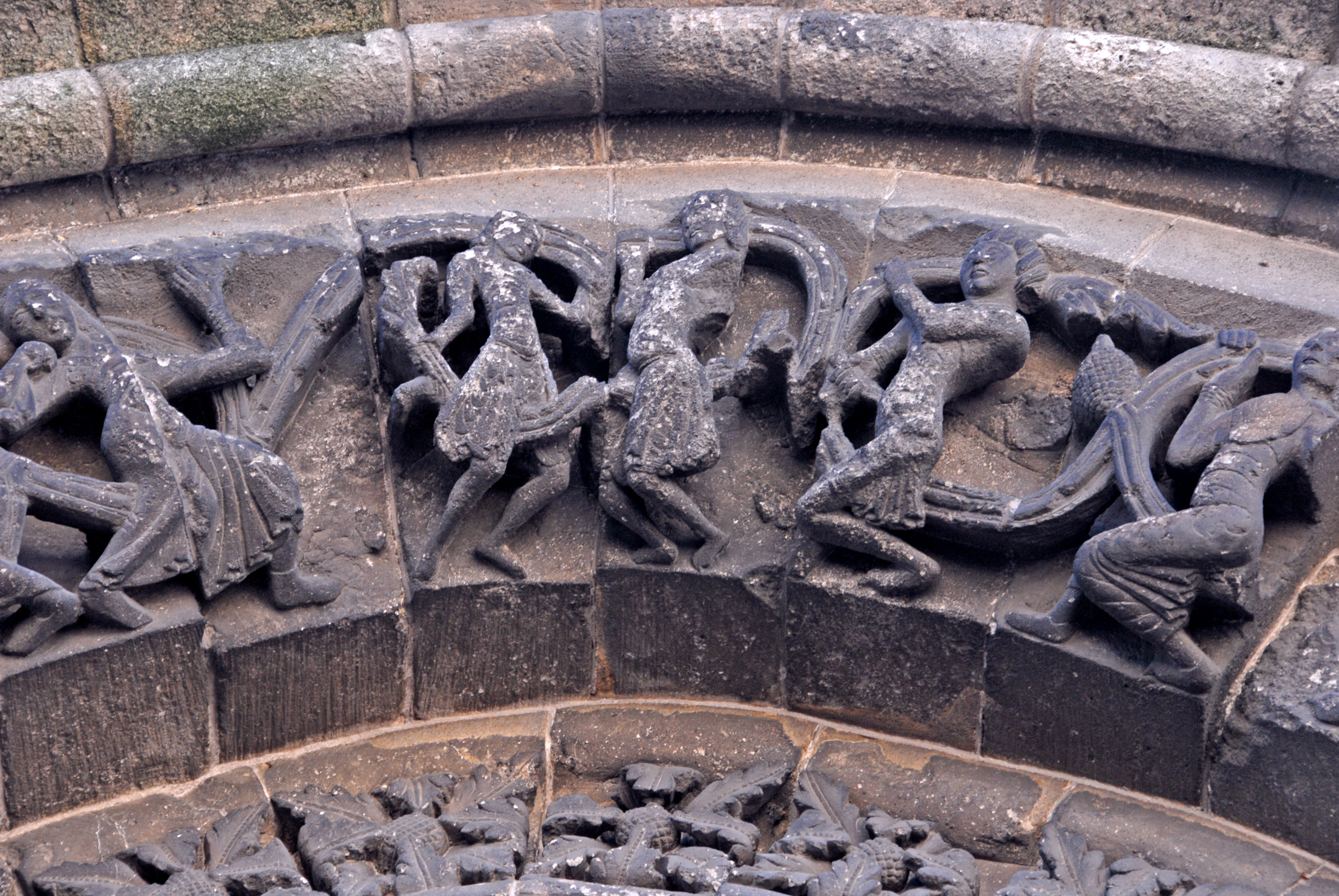 St-Pierre de Pont-l’Abbé-d’Arnoult (17), Detail obere Archivolte, Blindportal rechts